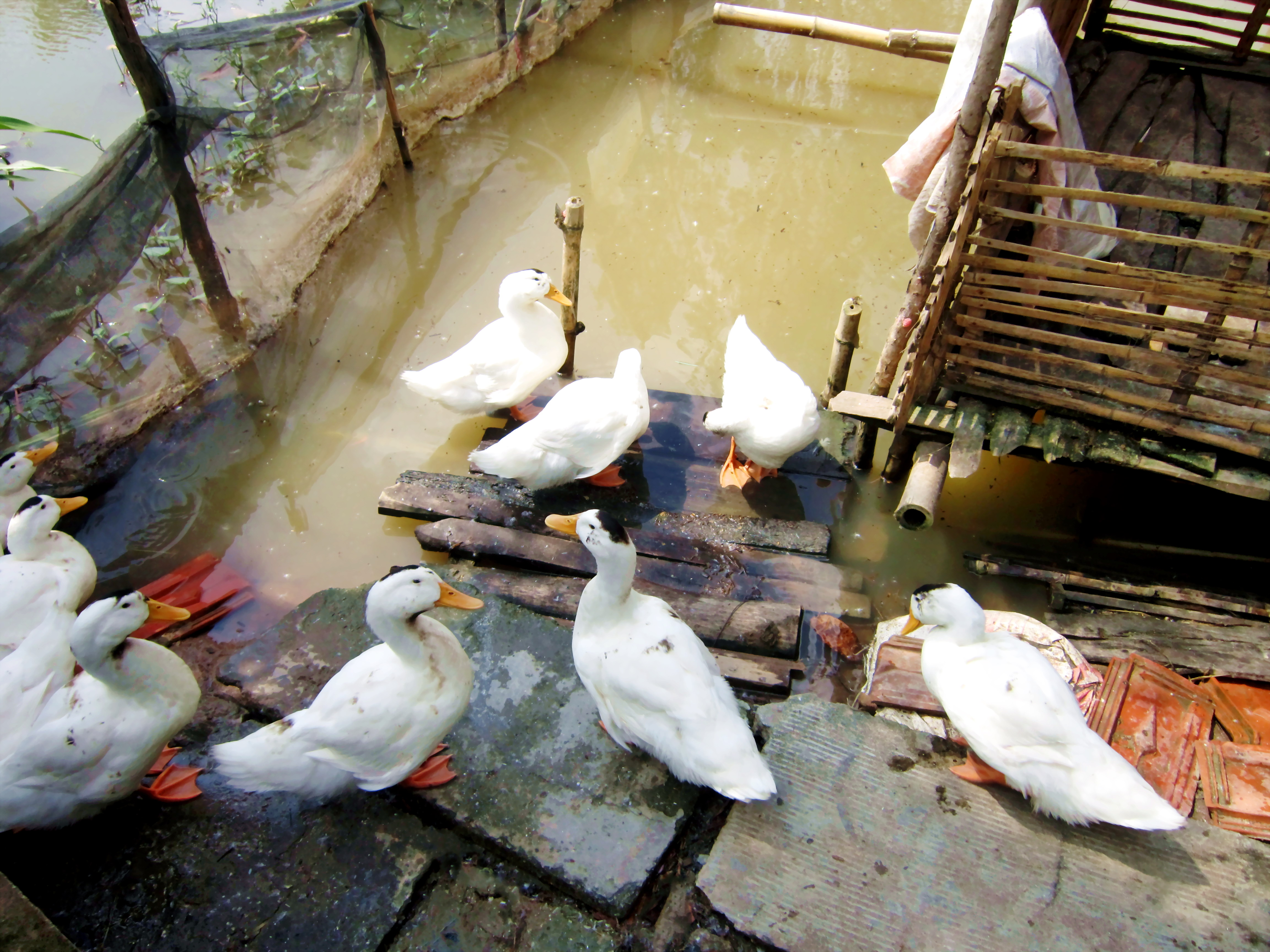 Một chuồng nuôi vịt (không bán, để dành ăn dần) trong một nhà dân ở miền Nam Việt Nam.